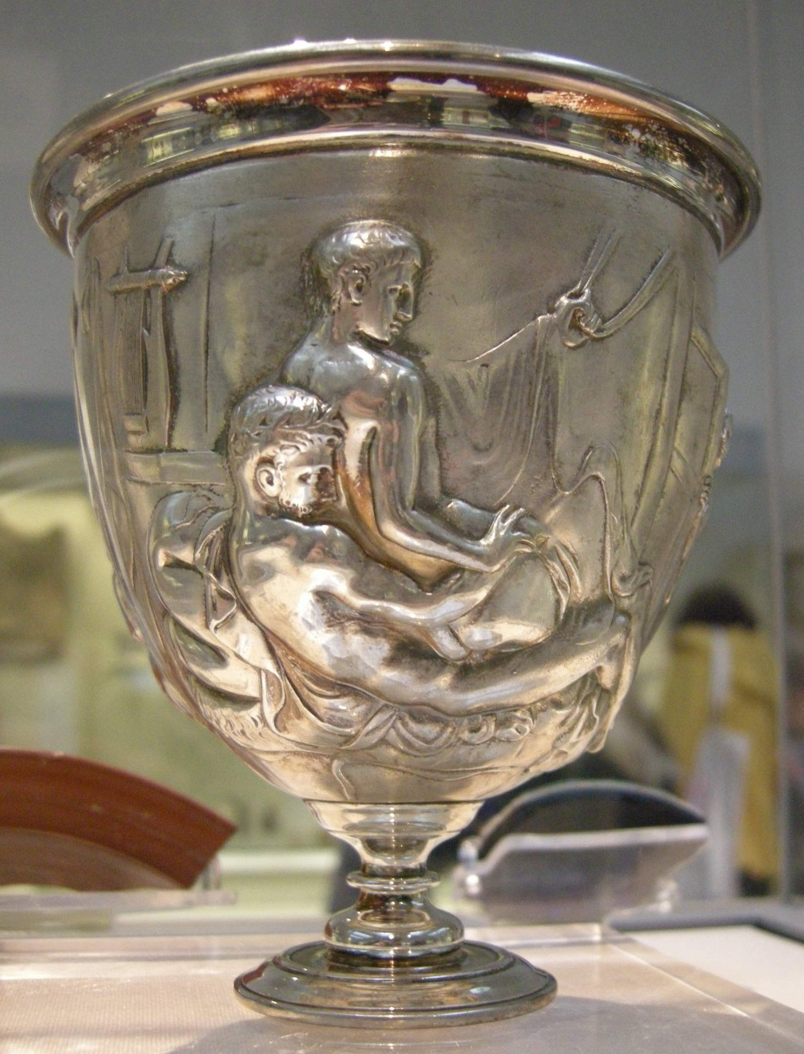 Coppa warren, 5-15 dc.